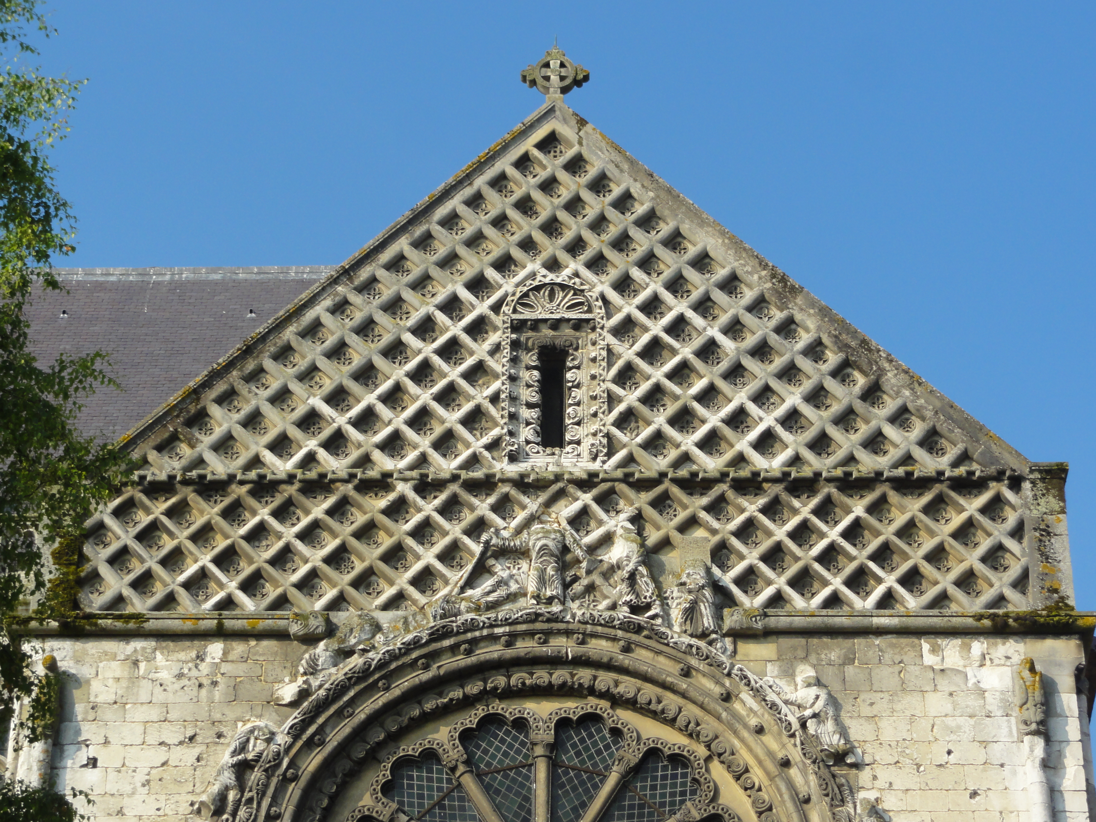 Croisillon nord, pignon.